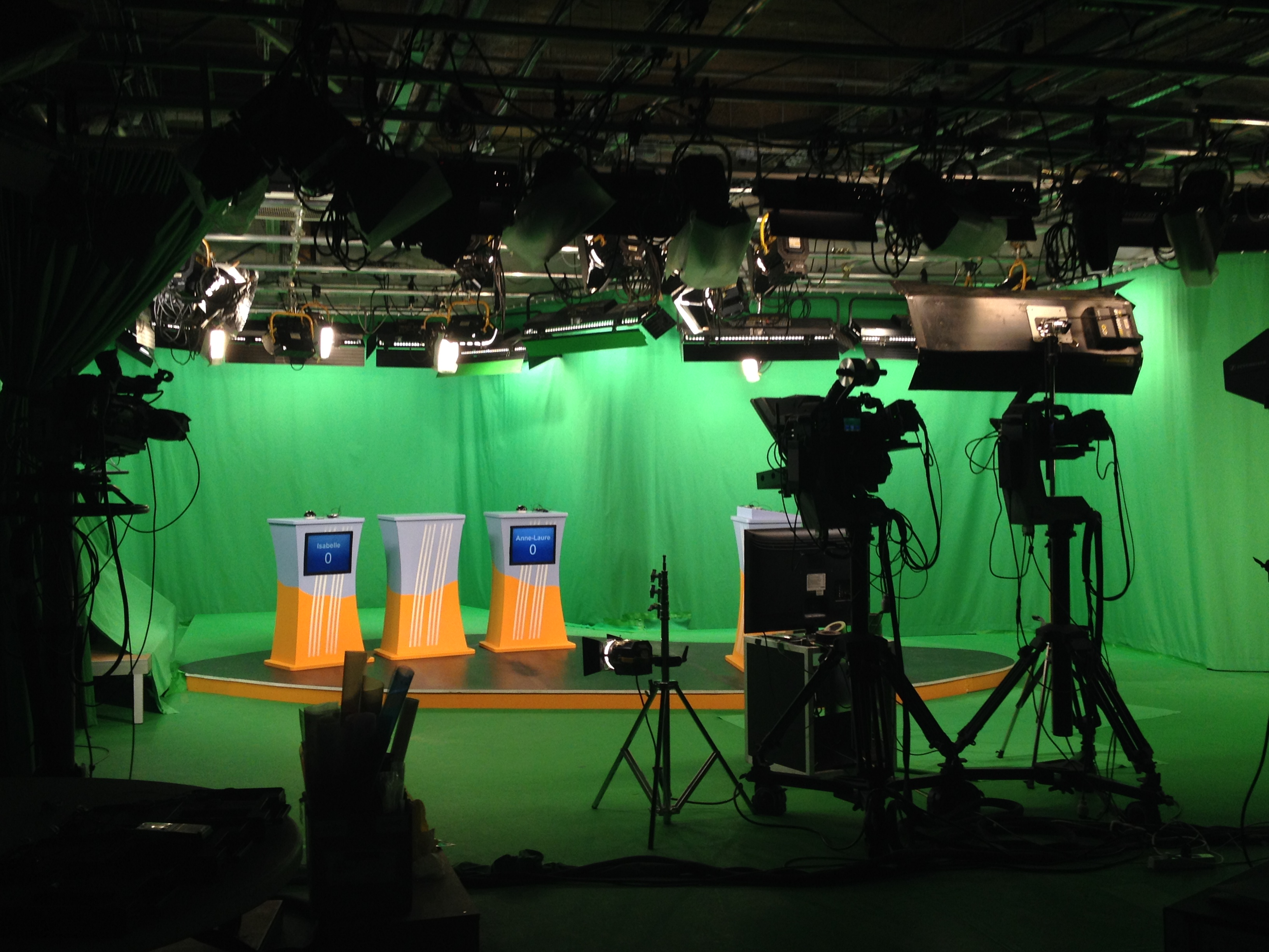 Plateau du Quiz du chrétien en marche avec caméras